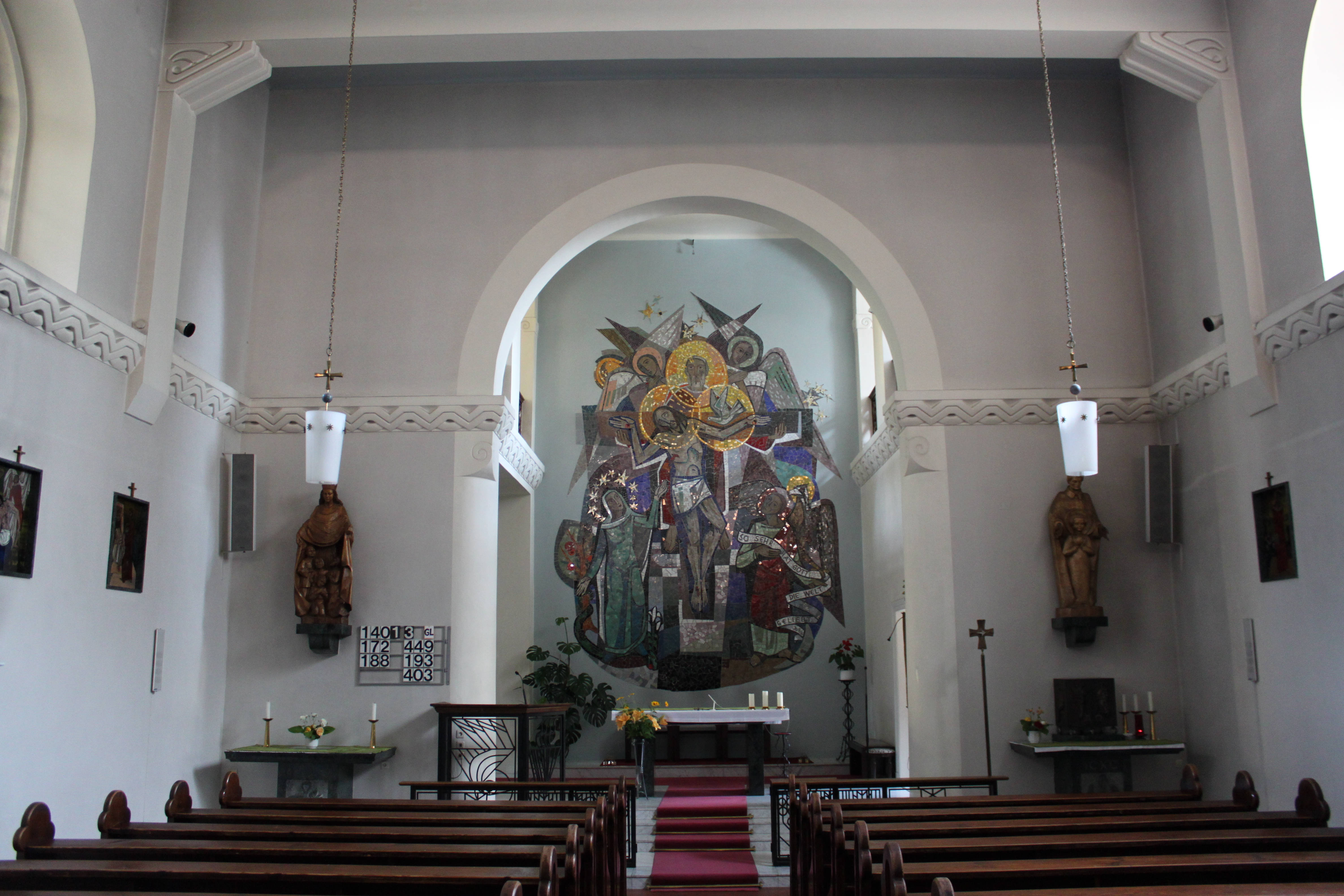 Innenraum der Dreifaltikeitskirche in Wien-Favoriten